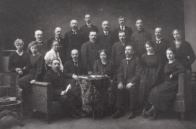 Ühistöö Viljandi osakonna eestseisus.